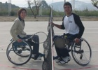 club esportiu guttmann